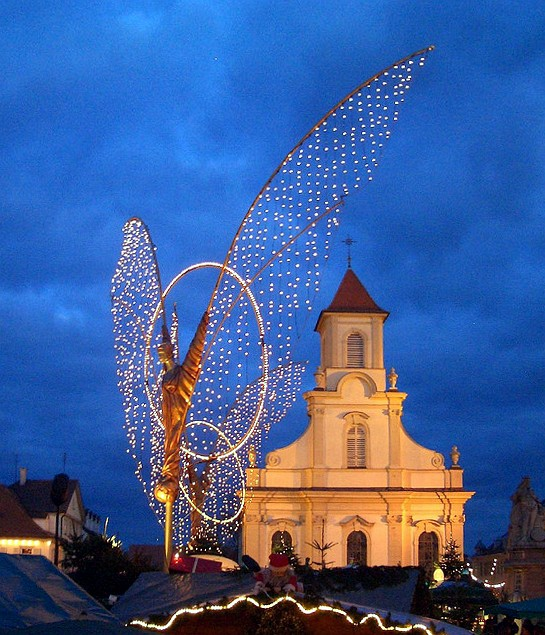 Der Barock-Weihnachtsmarkt auf dem Ludwigsburger Marktplatz mit Lichtengel und katholischer Kirche.